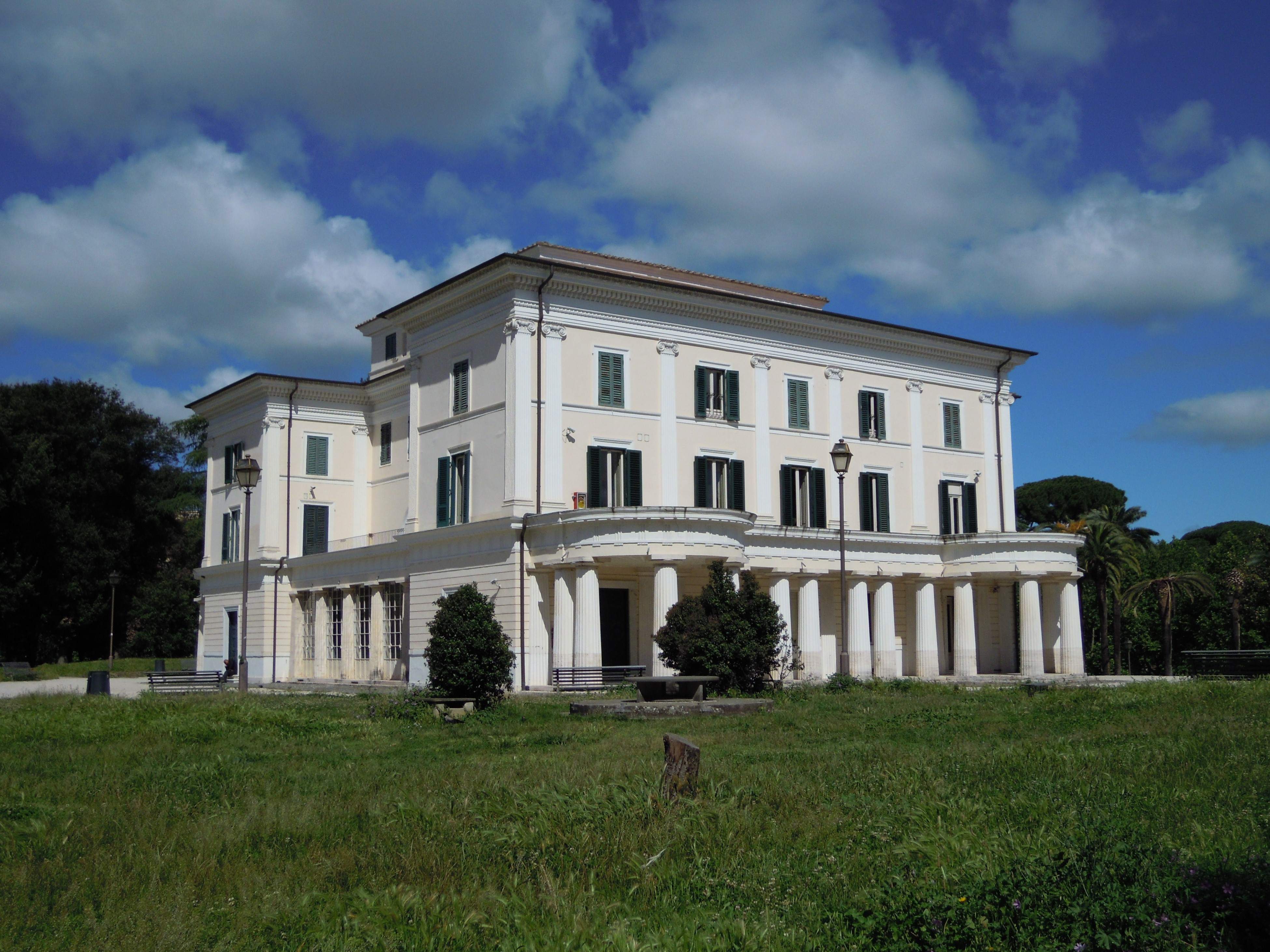 Roma, Villa Torlonia - Casino nobile